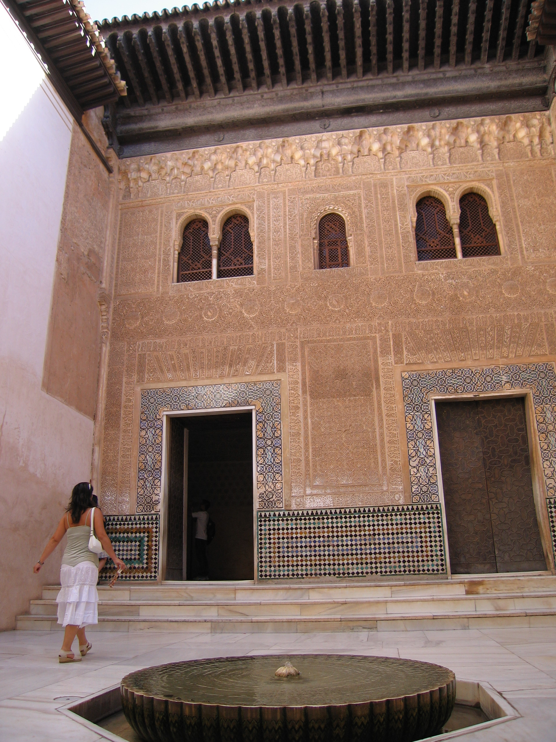 Cuarto Dorado, or Mexuar, in the Alhambra of Granada, Spain.Fachada de Comares. Palacio Nazaries, Alhambra, Granada